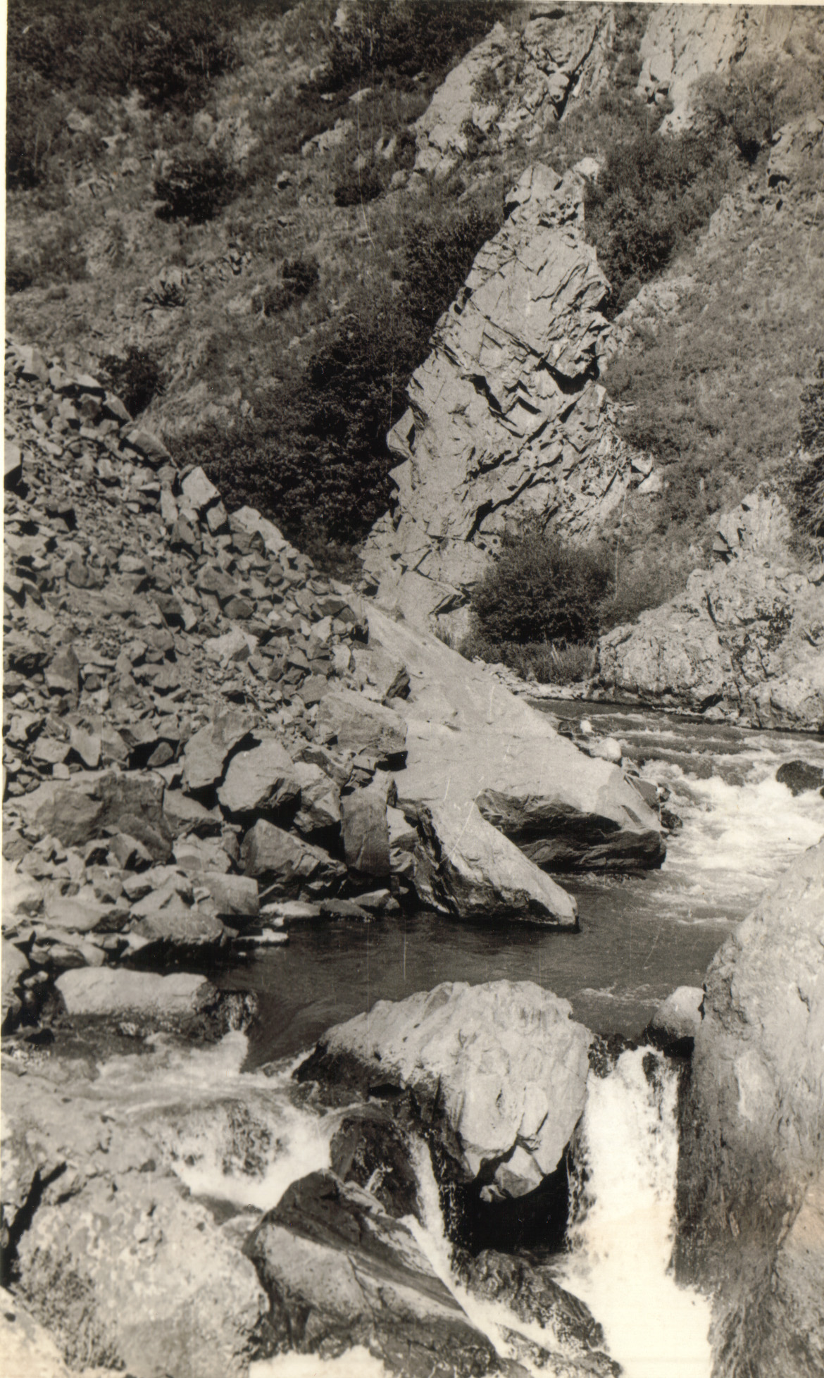 «Վարդան Մամիկոնյան» քարե քանդակը